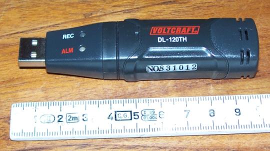 Datenlogger für Feuchte+Temperatur in Form eines USB-Sticks mit Speicher für 16.000 Messungen. Gut zu sehen ist rechts der eigentlich Sensorbereich mit den Gehäuseschlitzen. Die LEDs zeigen die laufende Messung bzw. das Überschreiten vordefinierter Alarmgrenzen an. Die Messung kann z.B. über den an der Rückseite befindlichen Taster gestartet werden.